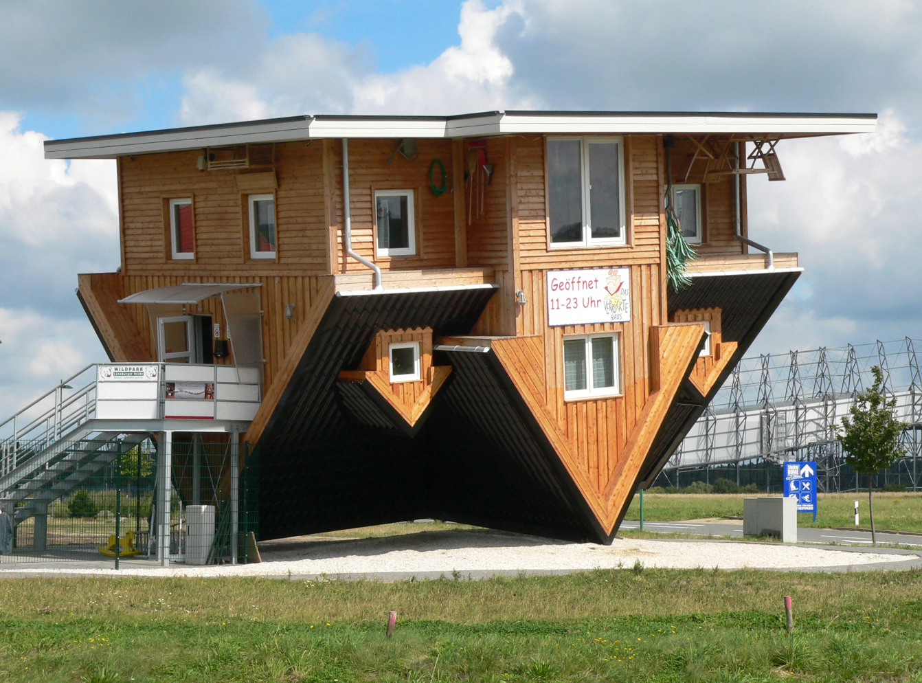 Auf dem Kopf stehendes Haus mit vollständiger Möblierung in Bispingen, Landkreis Soltau-Fallingbostel.